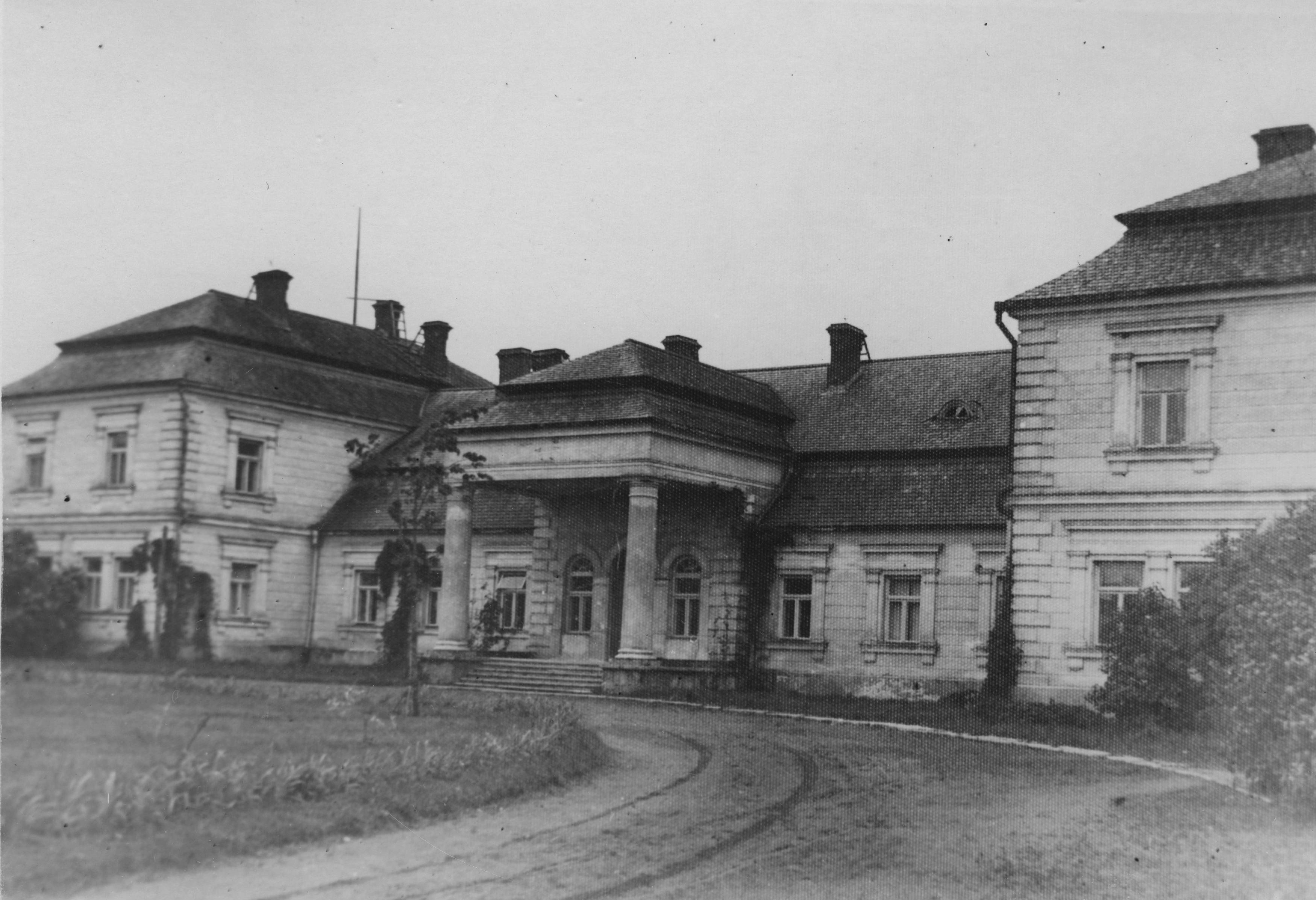 Беларуская (тарашкевіца): Опса (Opsa), сядзіба Плятэраў (Plater)